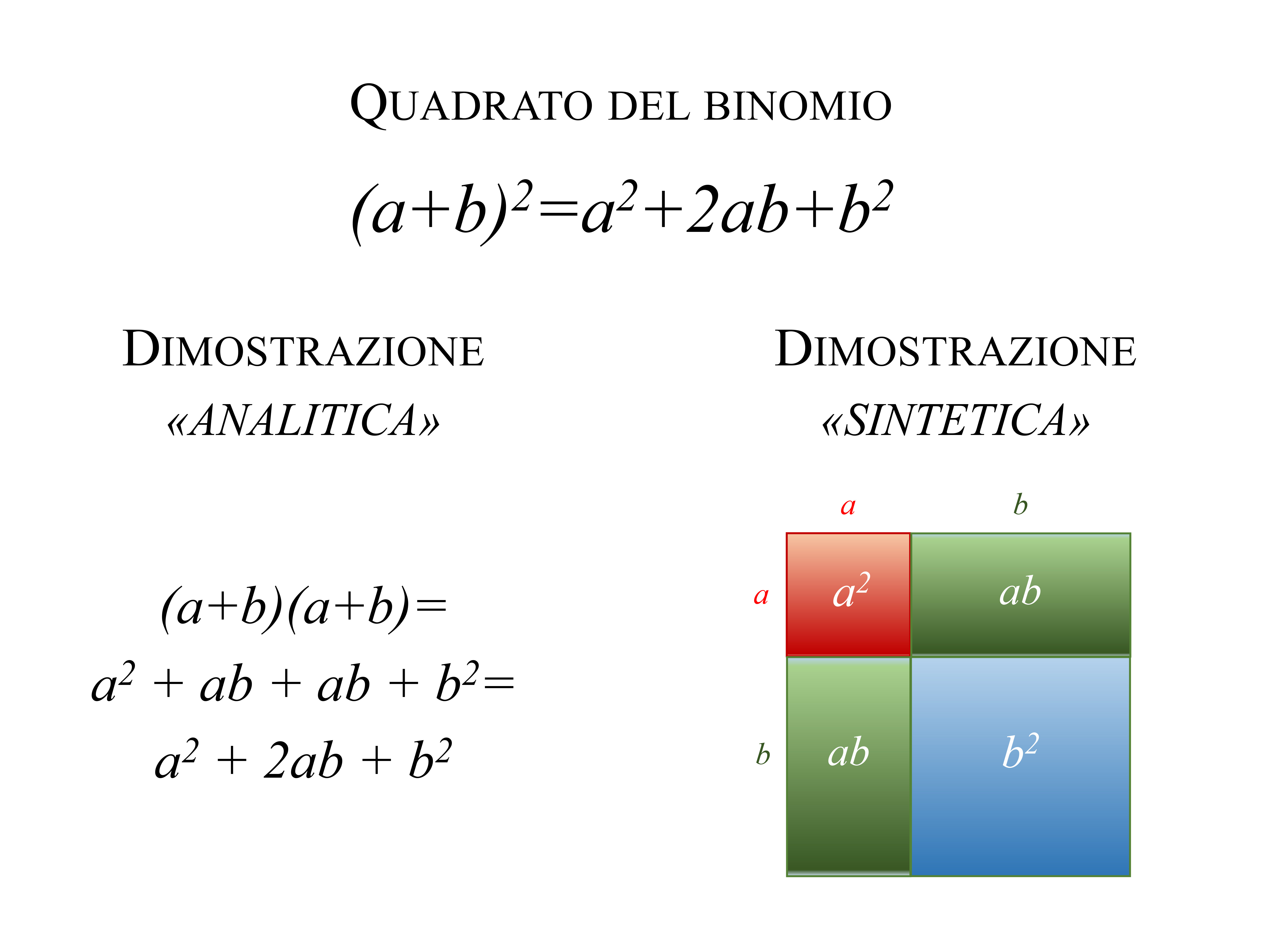 Schema descrittivo delle differenze tra una dimostrazione analitica ed una sintetica dello sviluppo del quadrato di un binomio